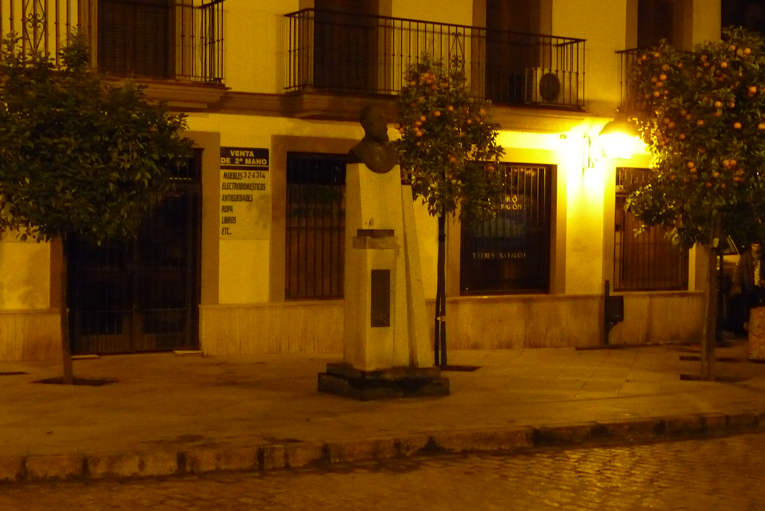 RamonDeCala-Jerez-p1010389.jpg